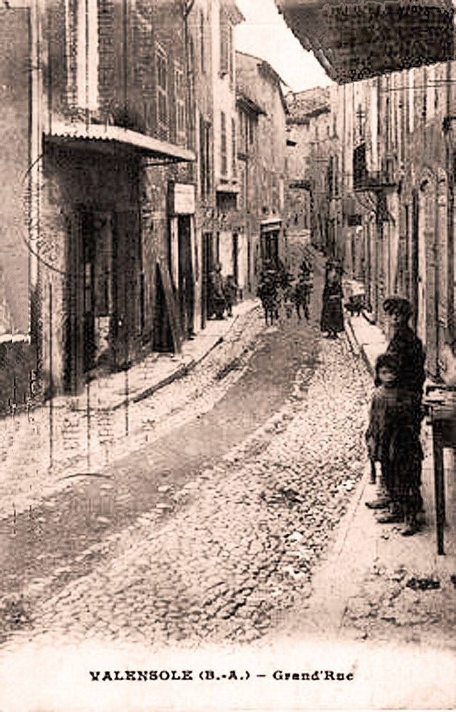 Grand Rue de Valensole au début du XXe siècle